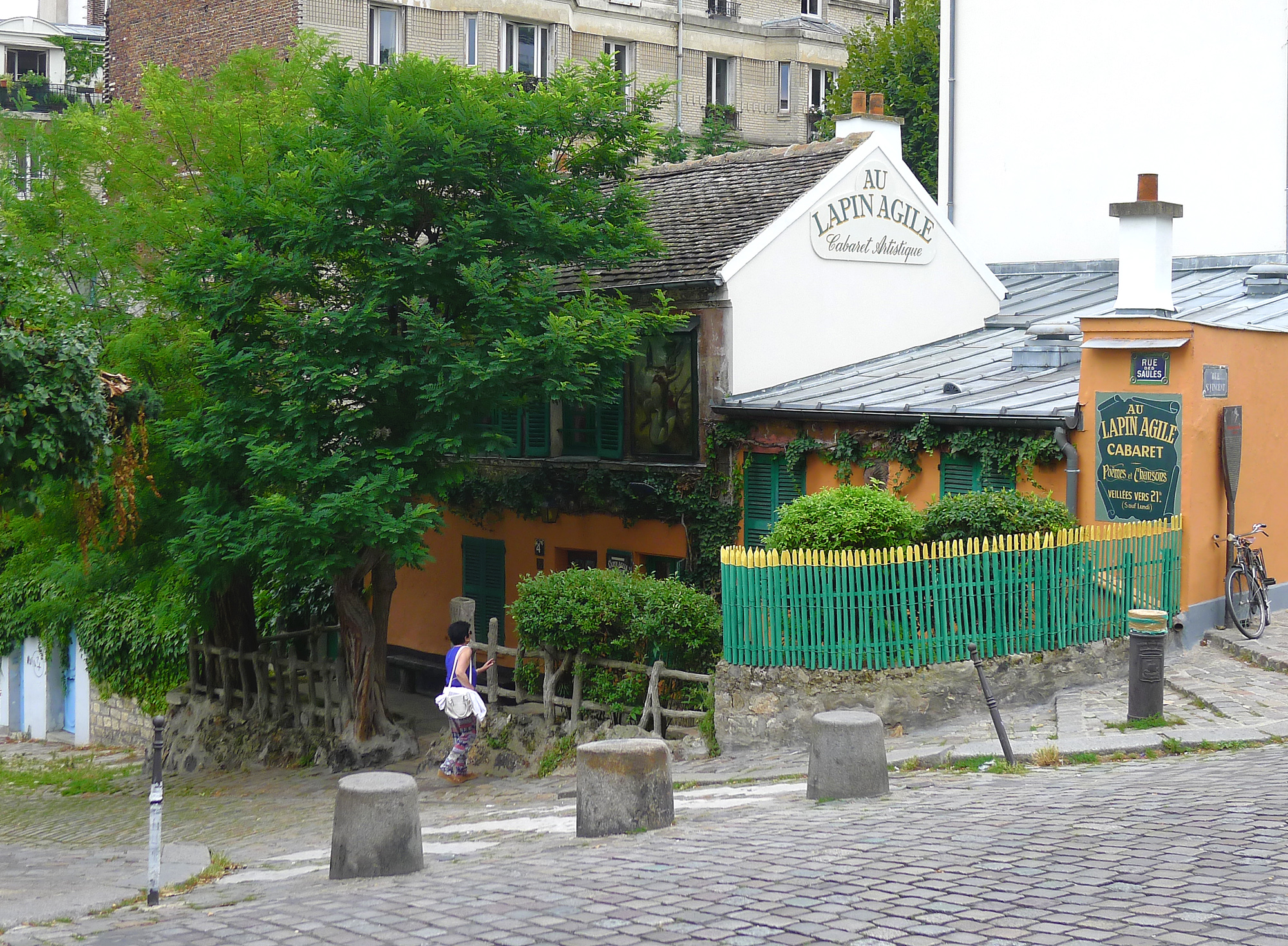 Au Lapin Agile - Paris XVIII